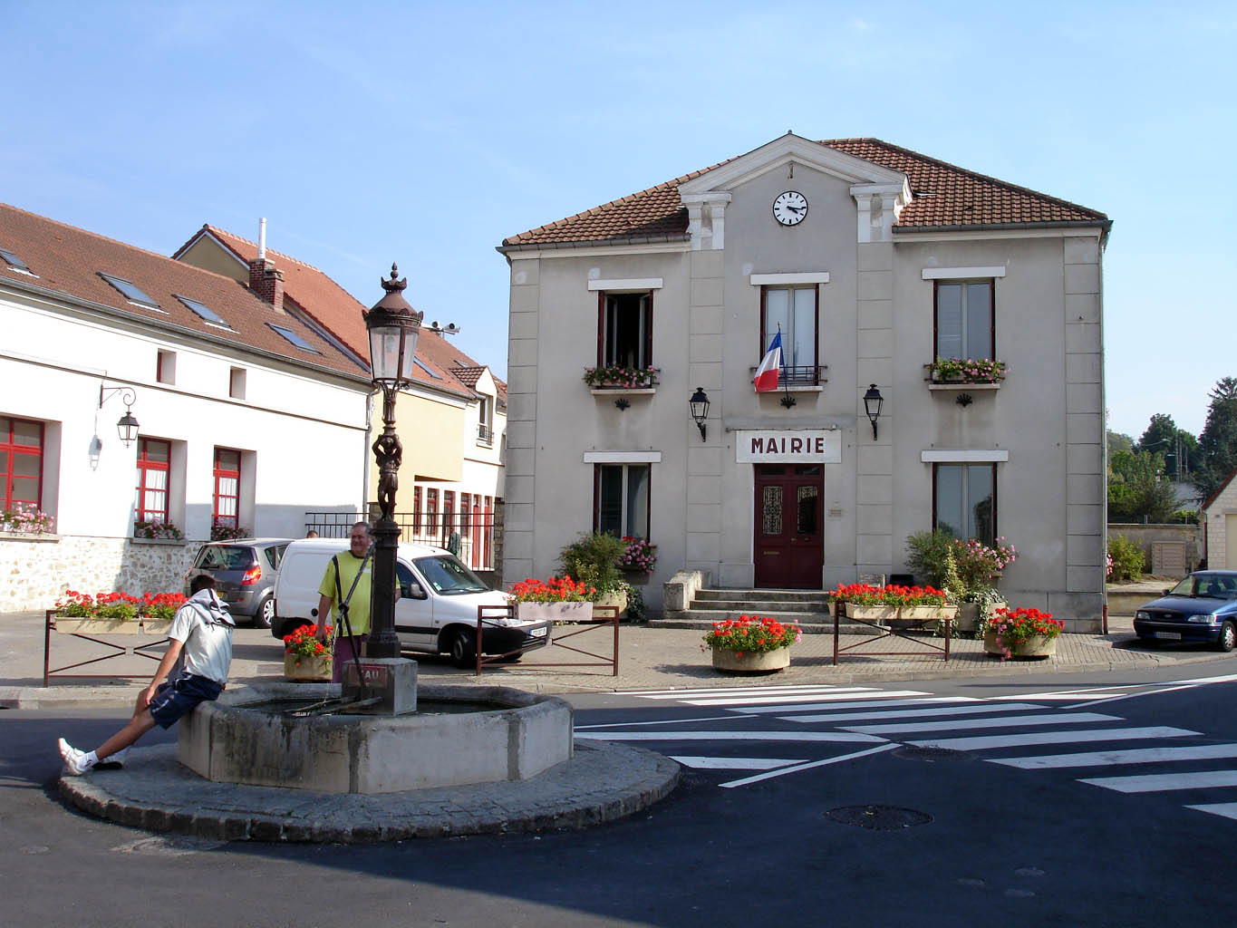 La Mairie et la fontaine à Frépillon (Val-d'Oise), France. Place de la Mairie